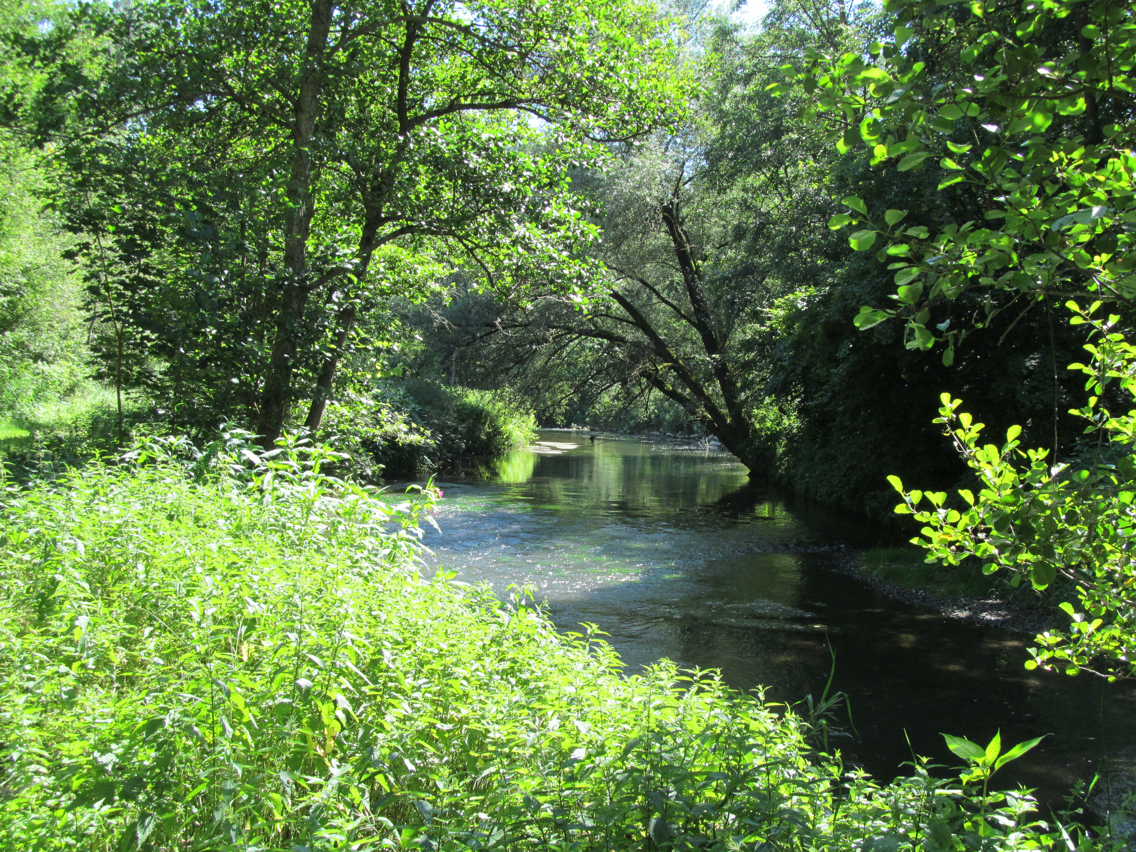 Mindel (Höhe Balzhausen) im Juli 2018.